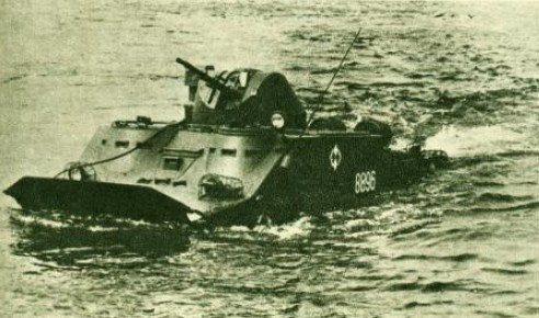 TOPAS-2AP zmodernizowany w Polsce: pojazd w czasie pływania [opis oryginalny]